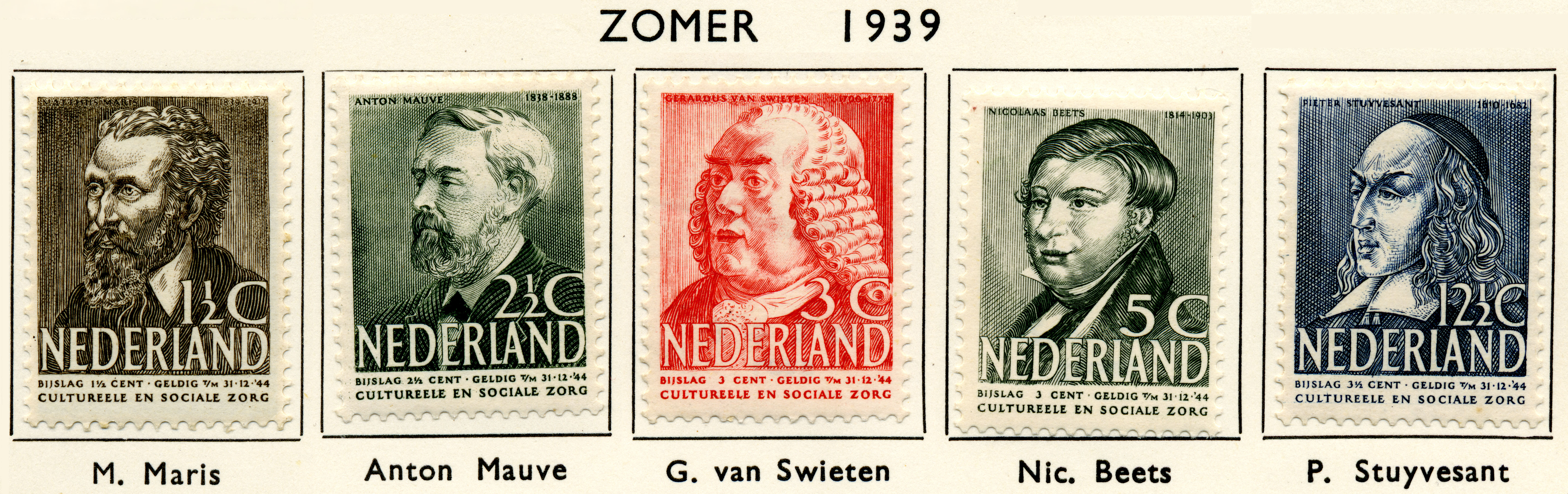 Zomerzegels (1939) Matthijs Maris 1839-1917, schilder / Anton Mauve 1838-1888, schilder/Gerard van Swieten 1700-1772, geneeskundige / Nicolaas Beets 1814-1903, theoloog en letterkundige/ Pieter Stuyvesant 1610-1672, gouveneur Curacao, later New York. NVPH nr 318-322. Ontwerpers E. Reitsma Valença (1½ en 3 ct), S.L. Hartz (2½ ct), Kuno Brinks (5 ct) en Hubert Levigne (12½ ct)